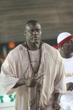 Lutteur senegalais , leader de la generation boule fallé